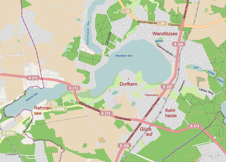 Übersicht des Ortsteils Wandlitz, nachbearbeitet aus OpenStreetMap